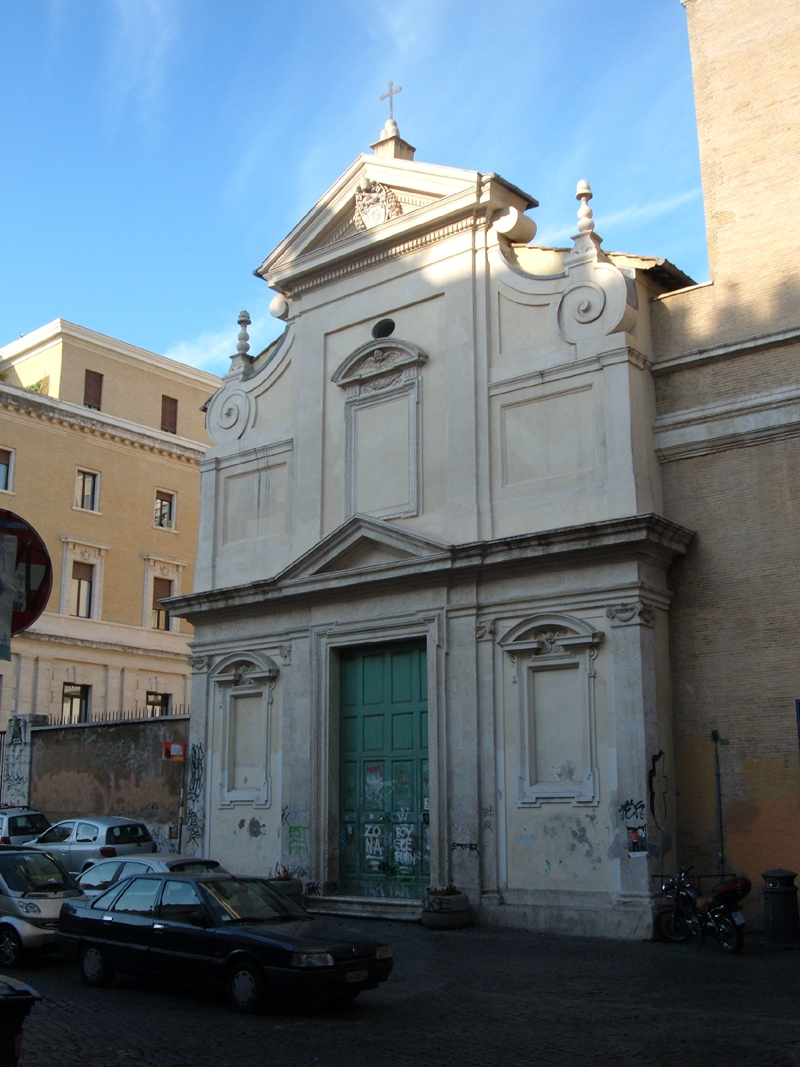 Eglise de Saint Calixte, à Rome, dans le "rione Trastevere"